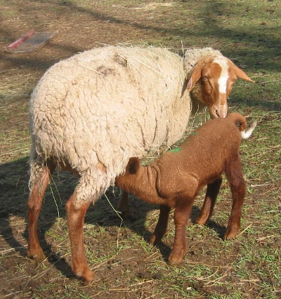 Brebis Mourérous allaitant son agneau Photo prise à Miscon , dans le Diois ( Drôme ) , Ferme des lamberts